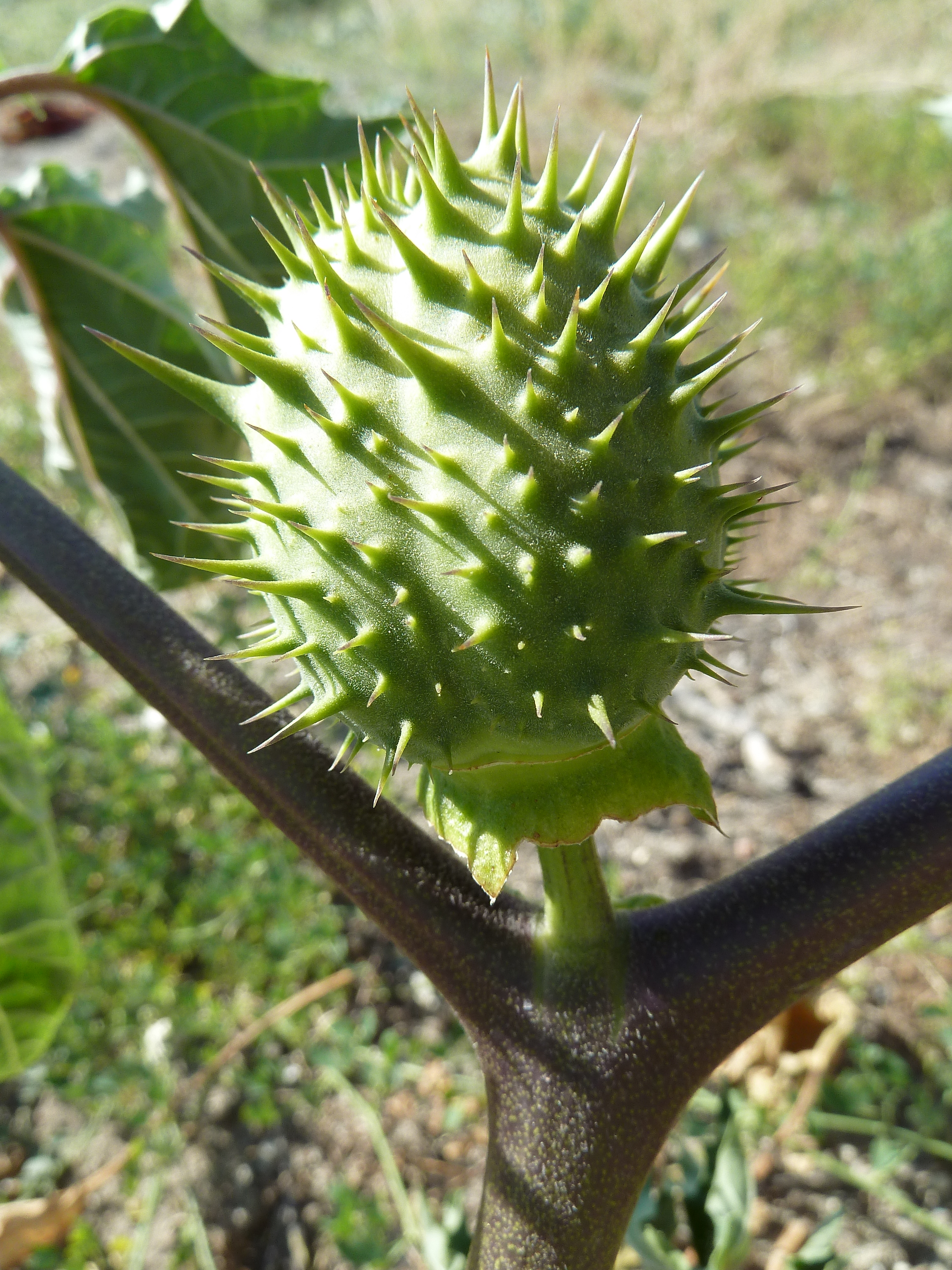 Datura stramonium (higuera loca, trompetilla) : Fruto inmaduro erecto in situ, con el habitual residuo persistente del cáliz - Vías FFCC Embajadores-Abroñigal, Madrid capital (España).